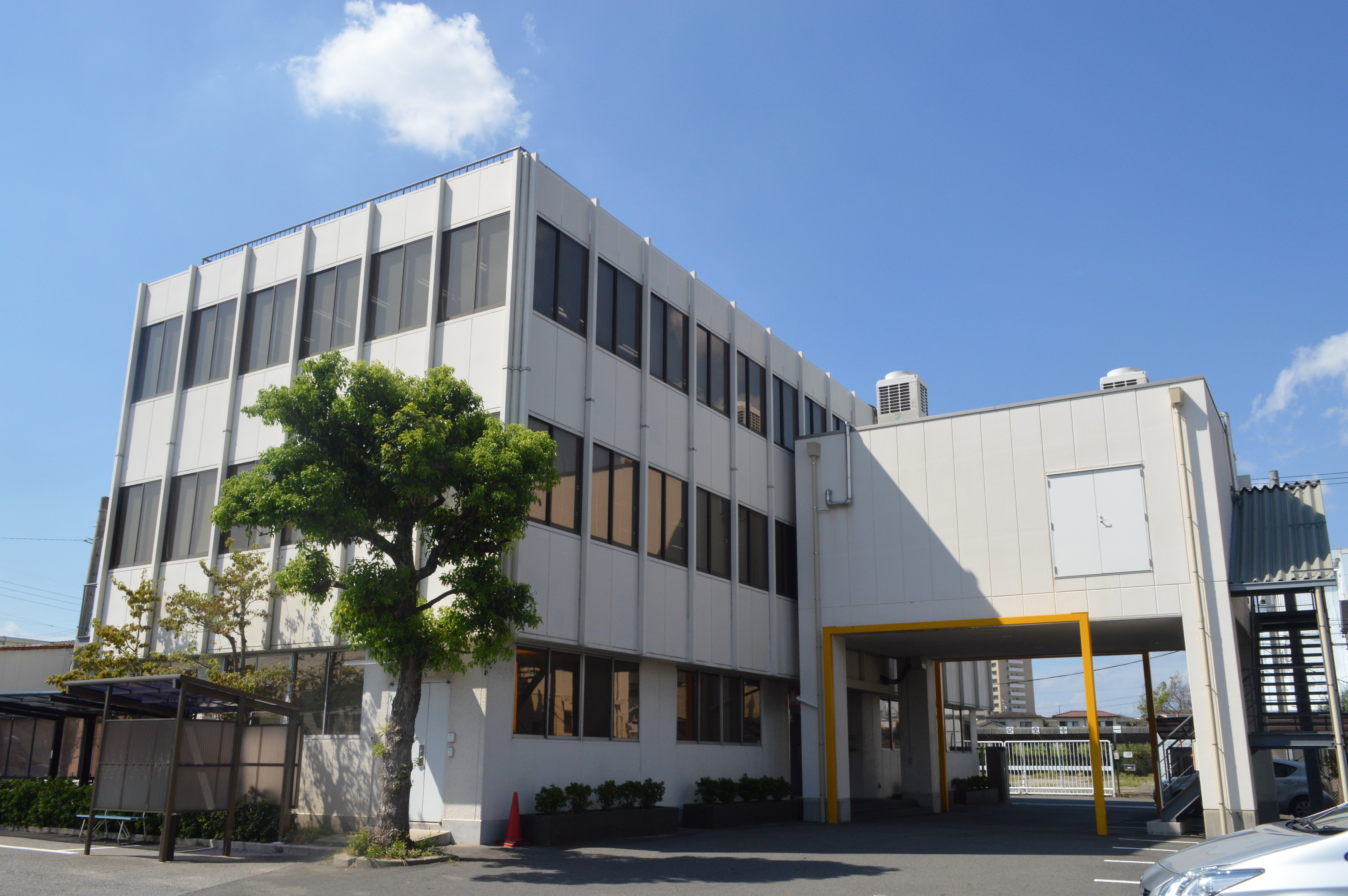 愛知県大府市大府町柊山町2丁目418番地の株式会社アペックス大府本社。